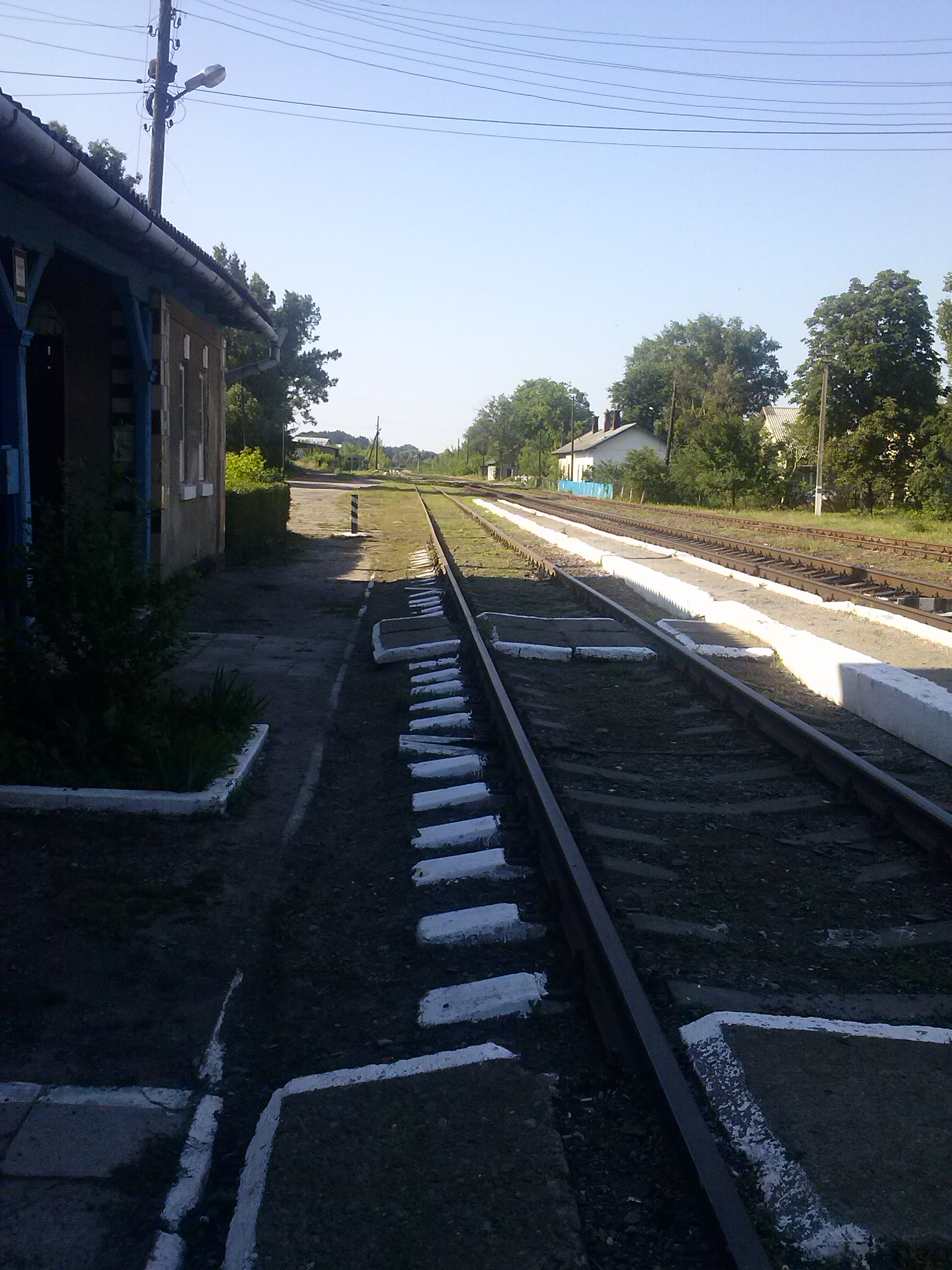 Вид в бік станції Стефанешти